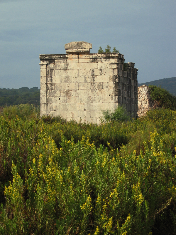 Patara